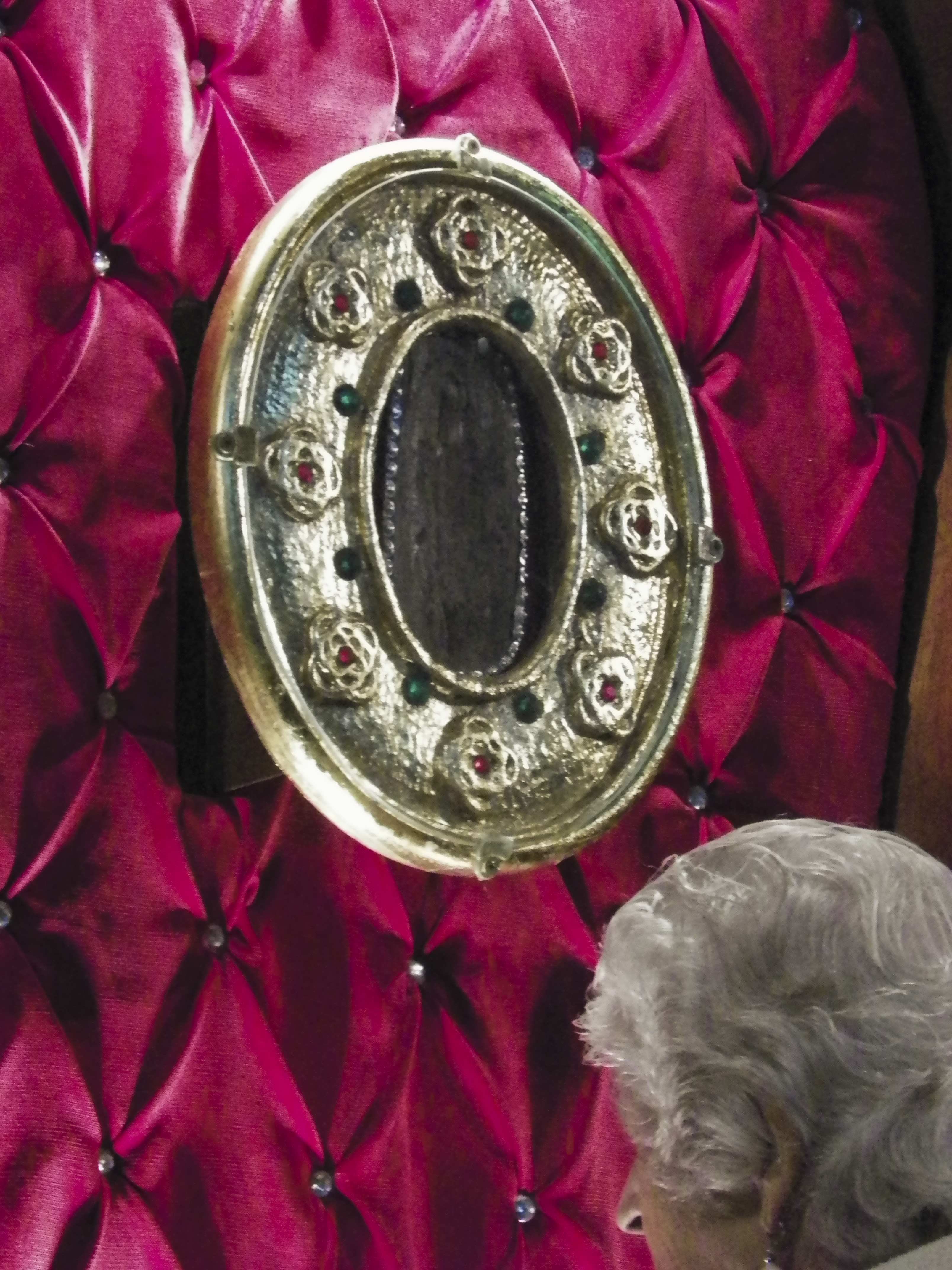 Trozo de madera en donde se apareció la imagen de la virgen de Torcoroma, exhibido en la iglesia del santuario.